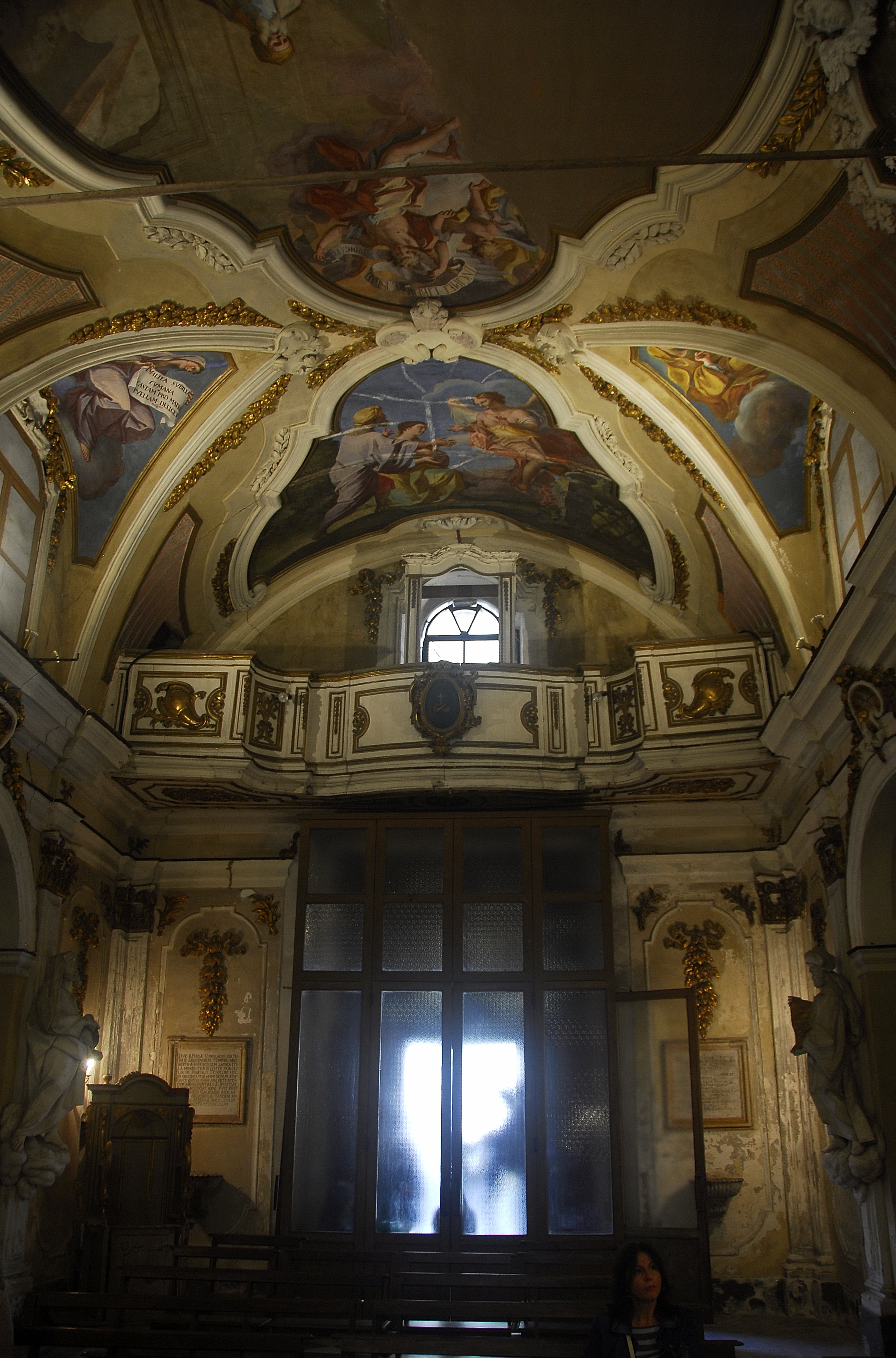 Chiesa di Santa Maria del Piliere - Santa Maria degli Angelini, Palermo, ITA, cripta